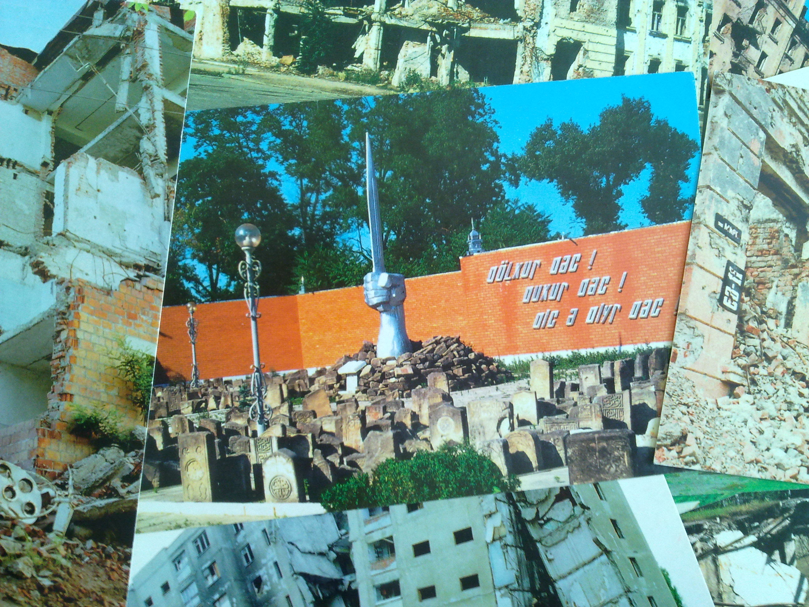 Carte postale montrant le Mémorial des Martyrs de la Déportation de 1944, à Grozny, en Tchétchénie, parmi celles représentant des ruines de Grozny après guerre de 1994-1996.